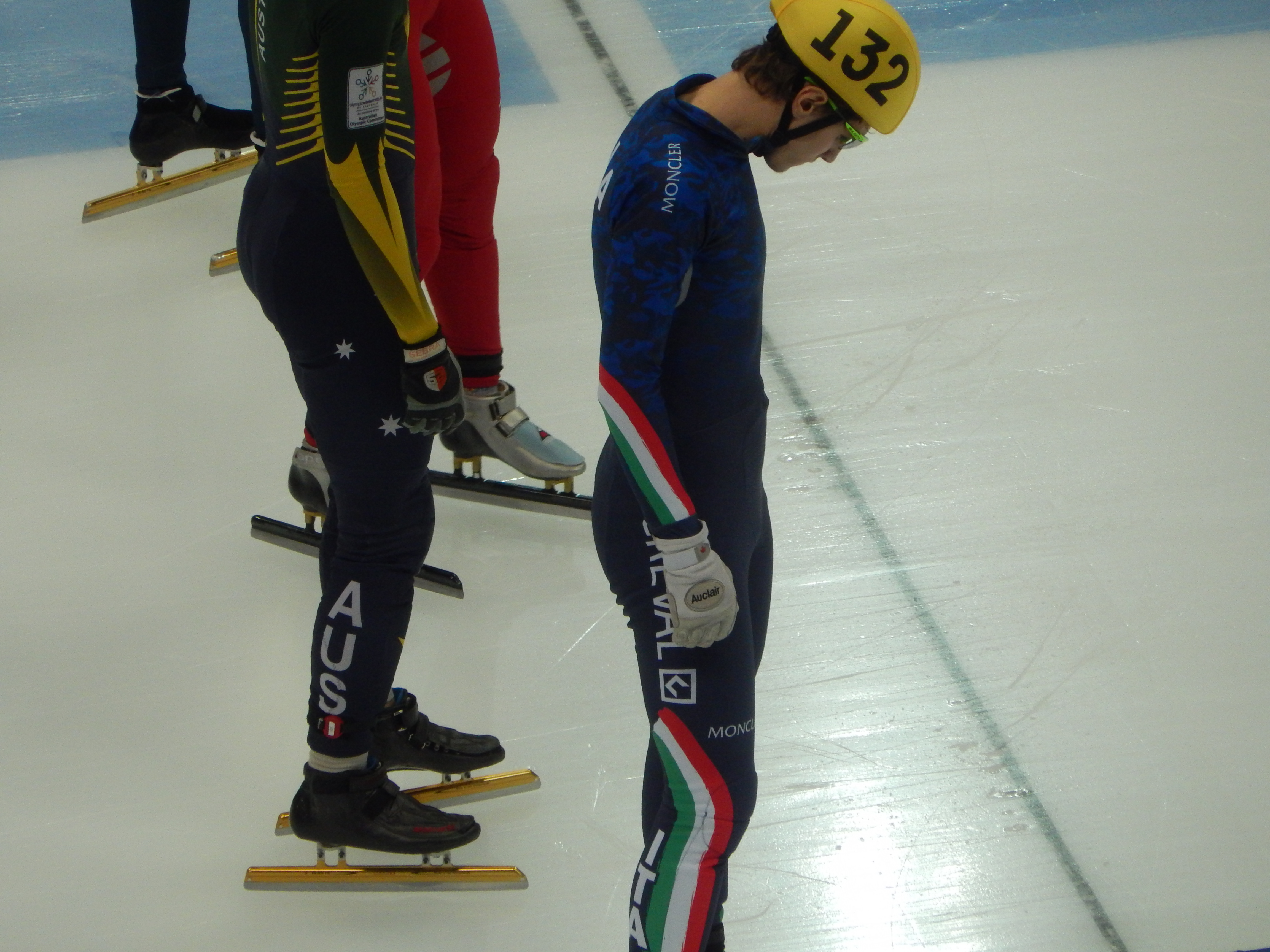 Чемпионат мира по шорт-треку 2015 в Москве Квалификационный раунд, 4 забег, 1000 м, мужчины